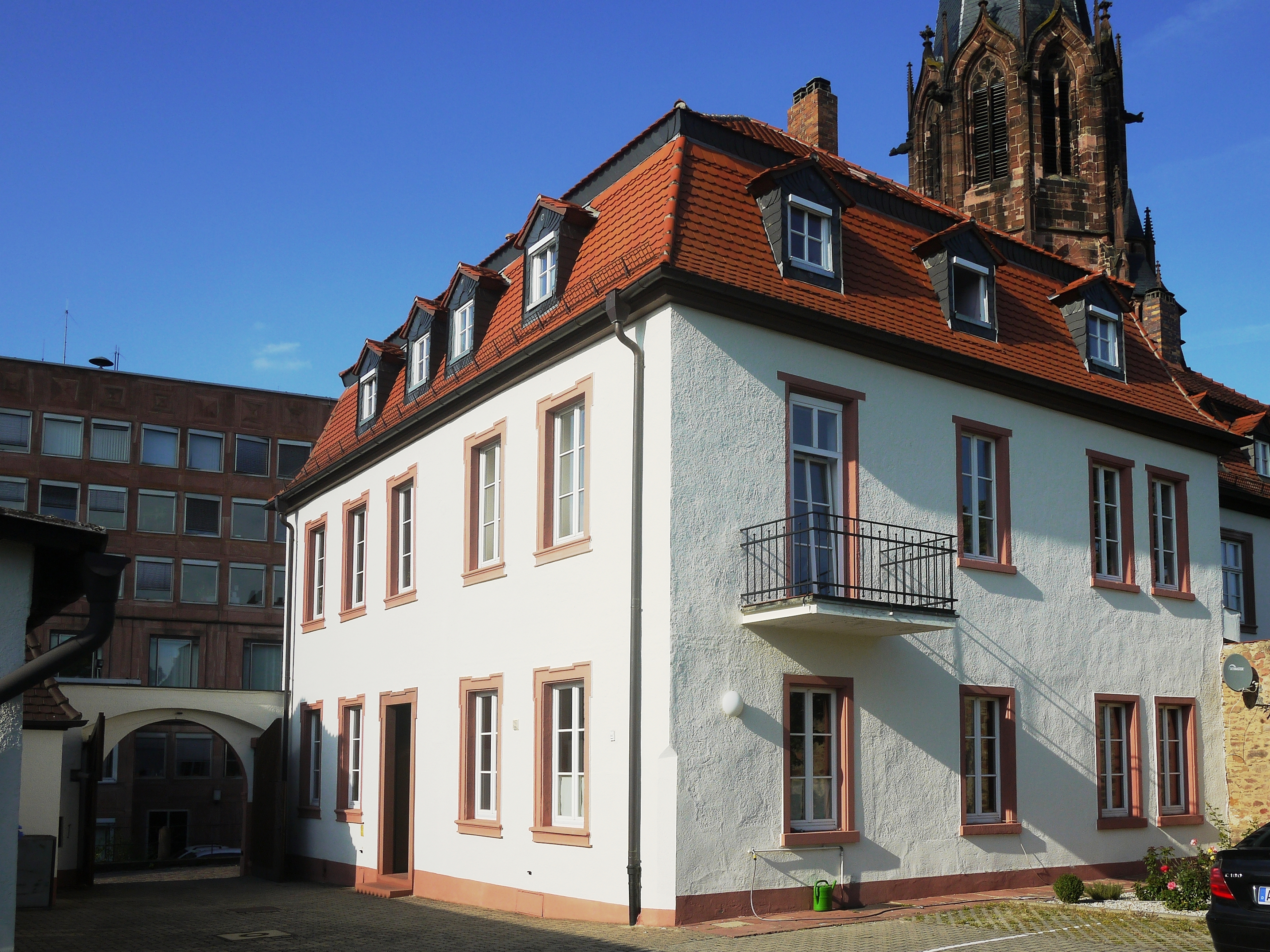 Stiftsgasse 7 in Aschaffenburg, denkmalgeschützt